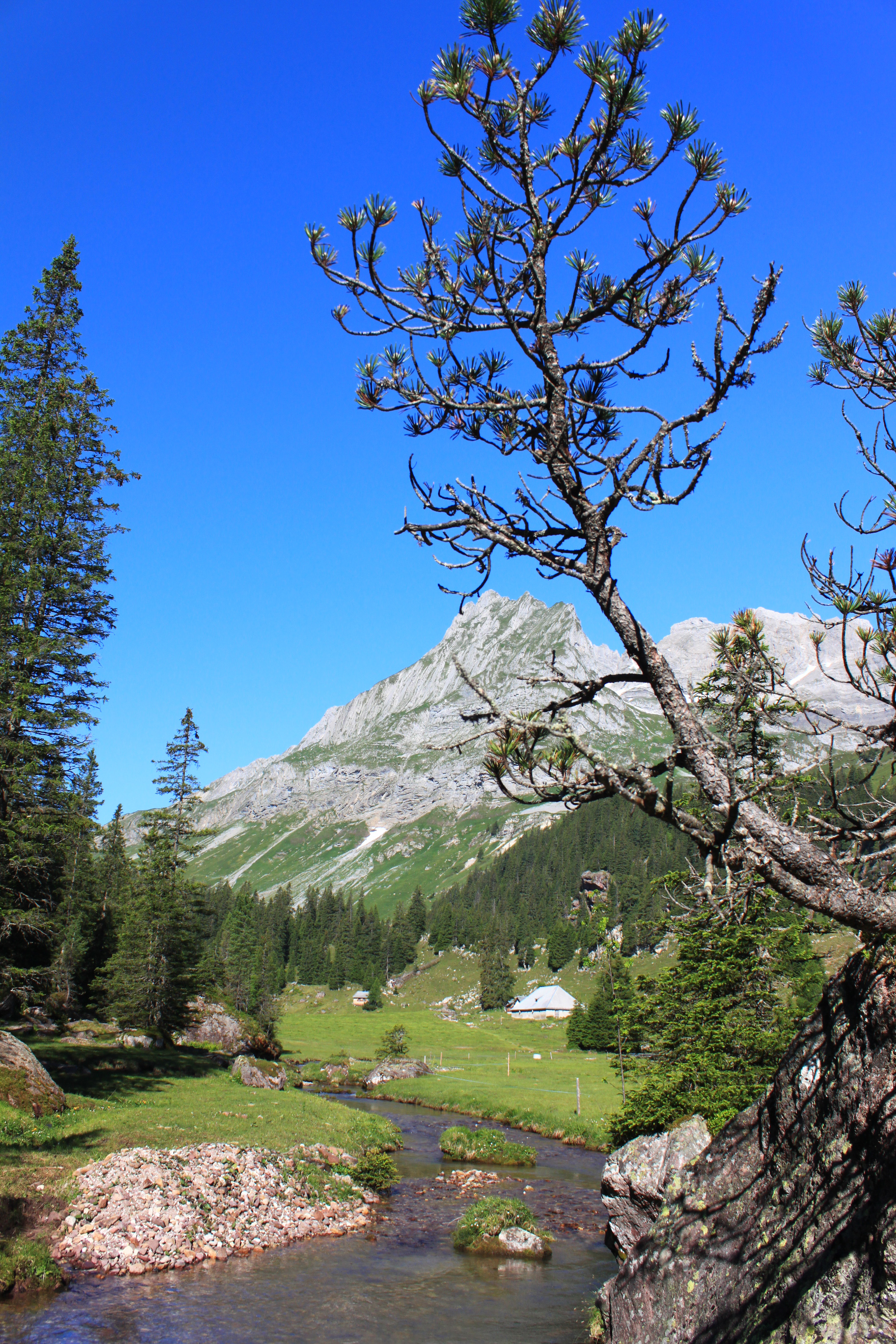 Blick nach Unter Mürtschen (1494 m.ü.M.) im Mürtschental. Im Hintergrund steht der Große Mürtschenstock (2441 m.ü.M ).